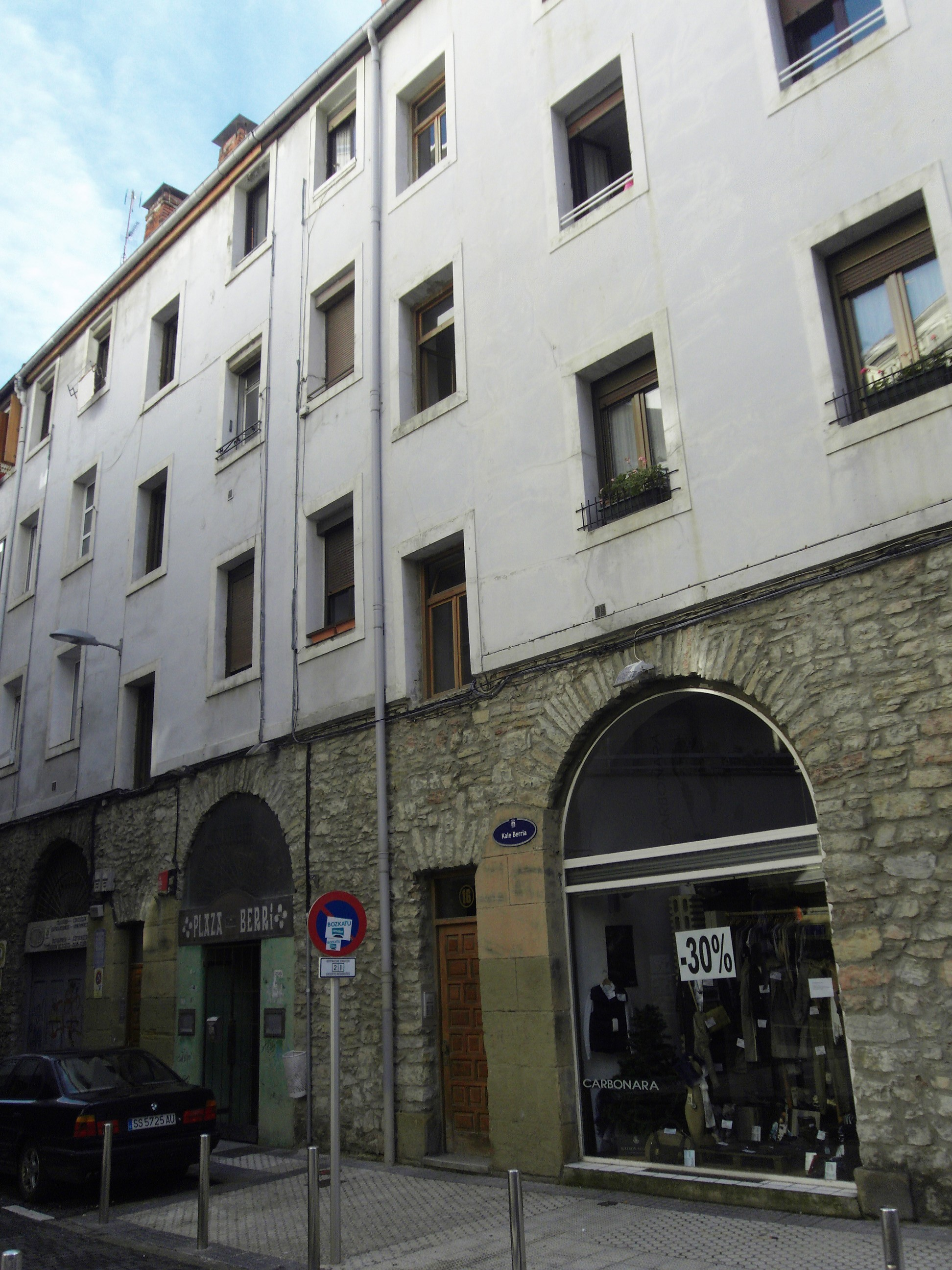 Groseko trinketaren kanpoaldea, kale Berria, Donostia